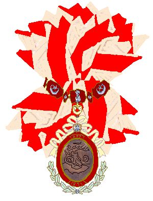 Huisorde van de Osmanen